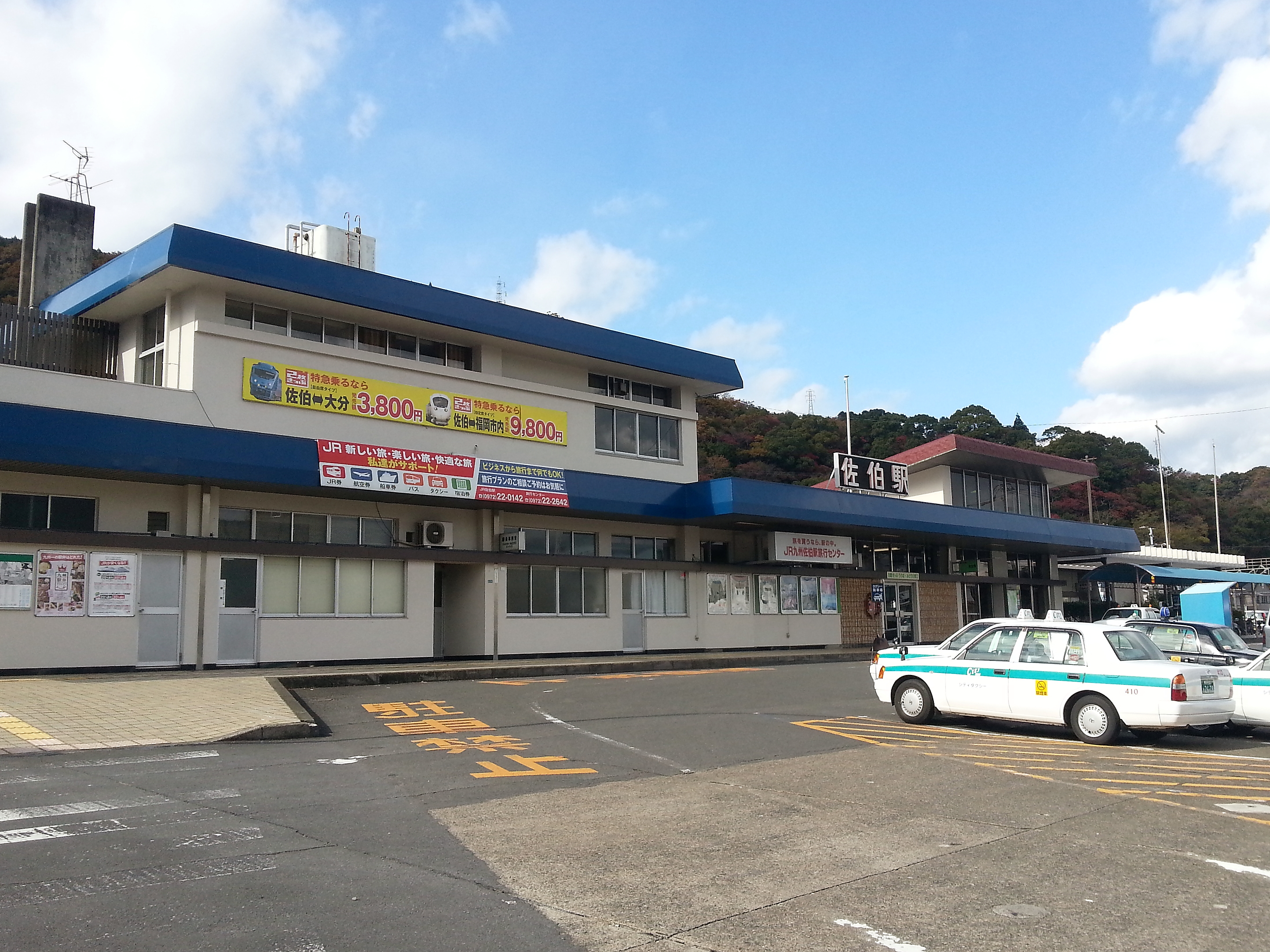 JR 佐伯駅